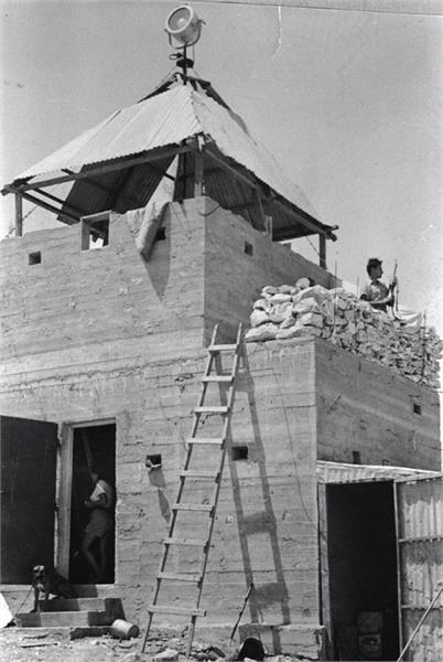 יקנעם - מגדל הצופים